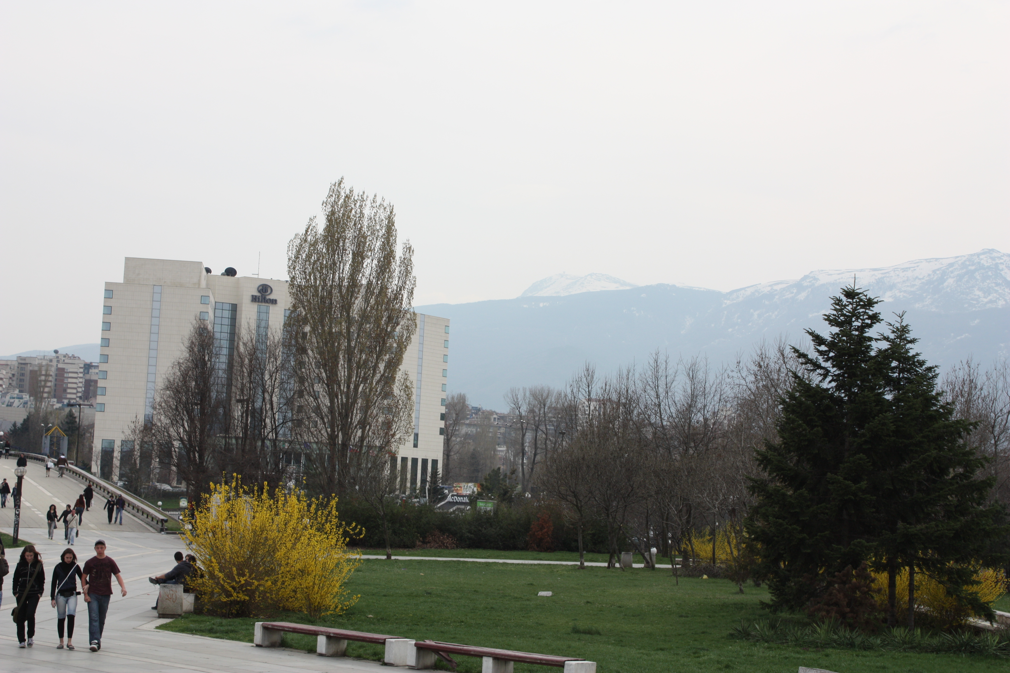 National Palace of Culture (Bulgaria), Sofia, Bulgaria